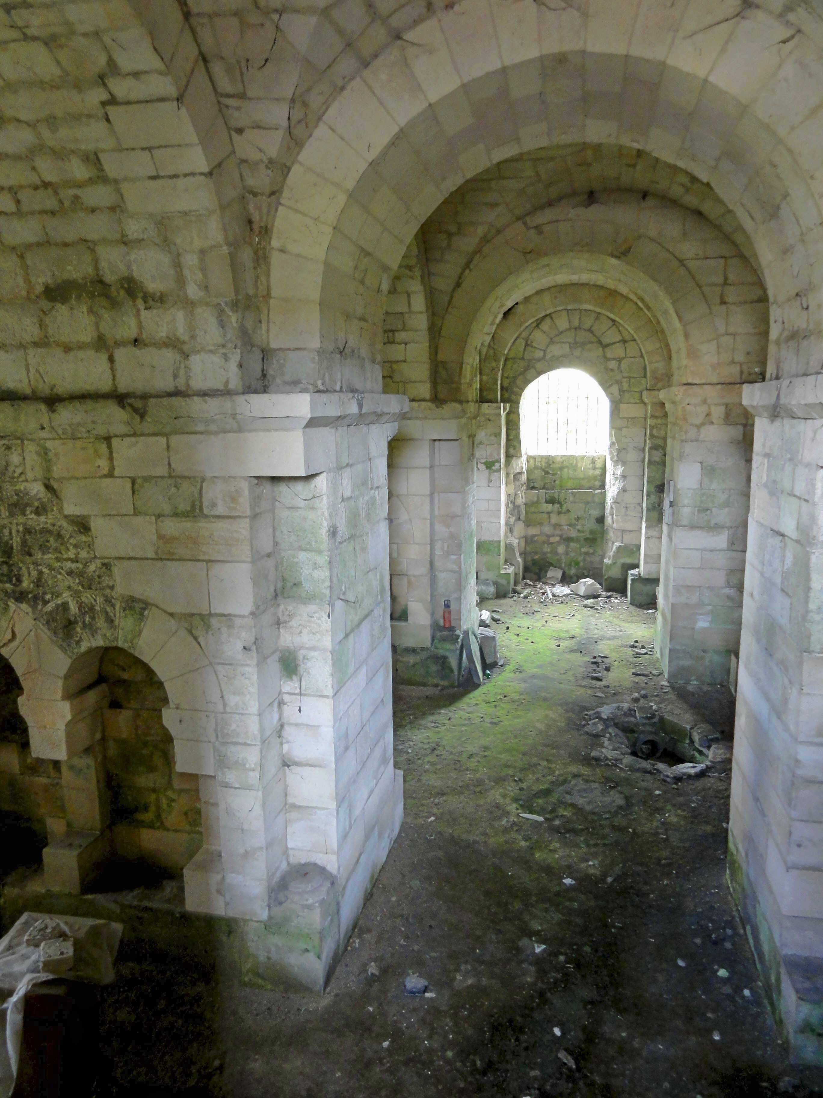 Transept, vue nord-sud.